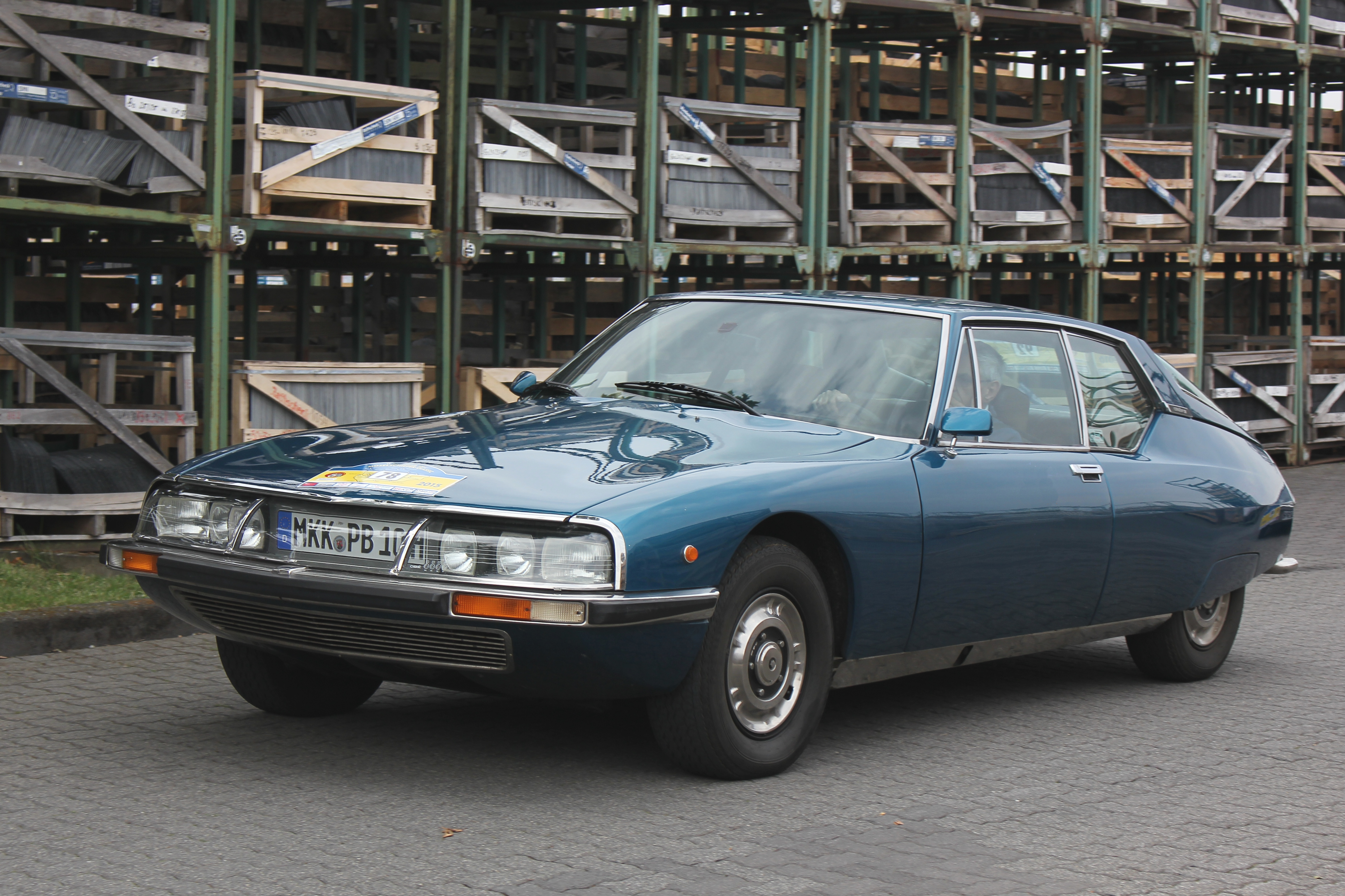 Citroën SM, Bauzeit 1970 bis 1975 (Kennzeichen des Fahrzeugs verändert)